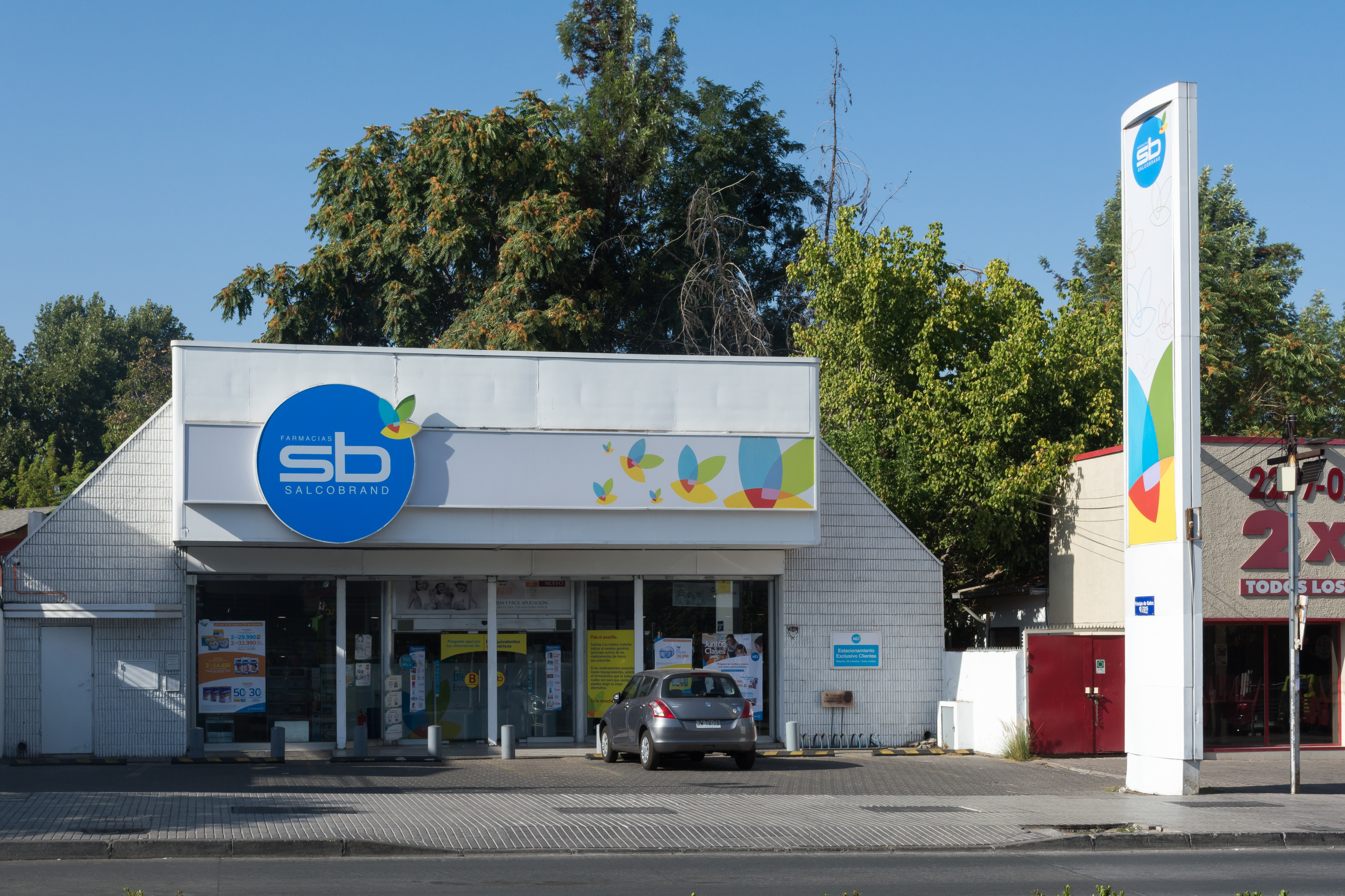 Salcobrand Príncipe de Gales, La Reina, Santiago, Región Metropolitana, Chile